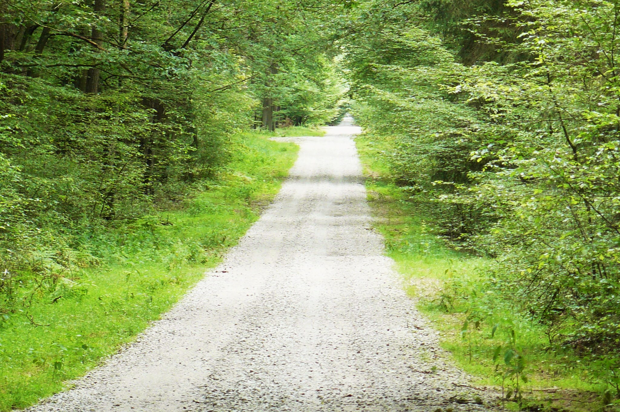 Trakt Poznański w Puszczy Zielonce.